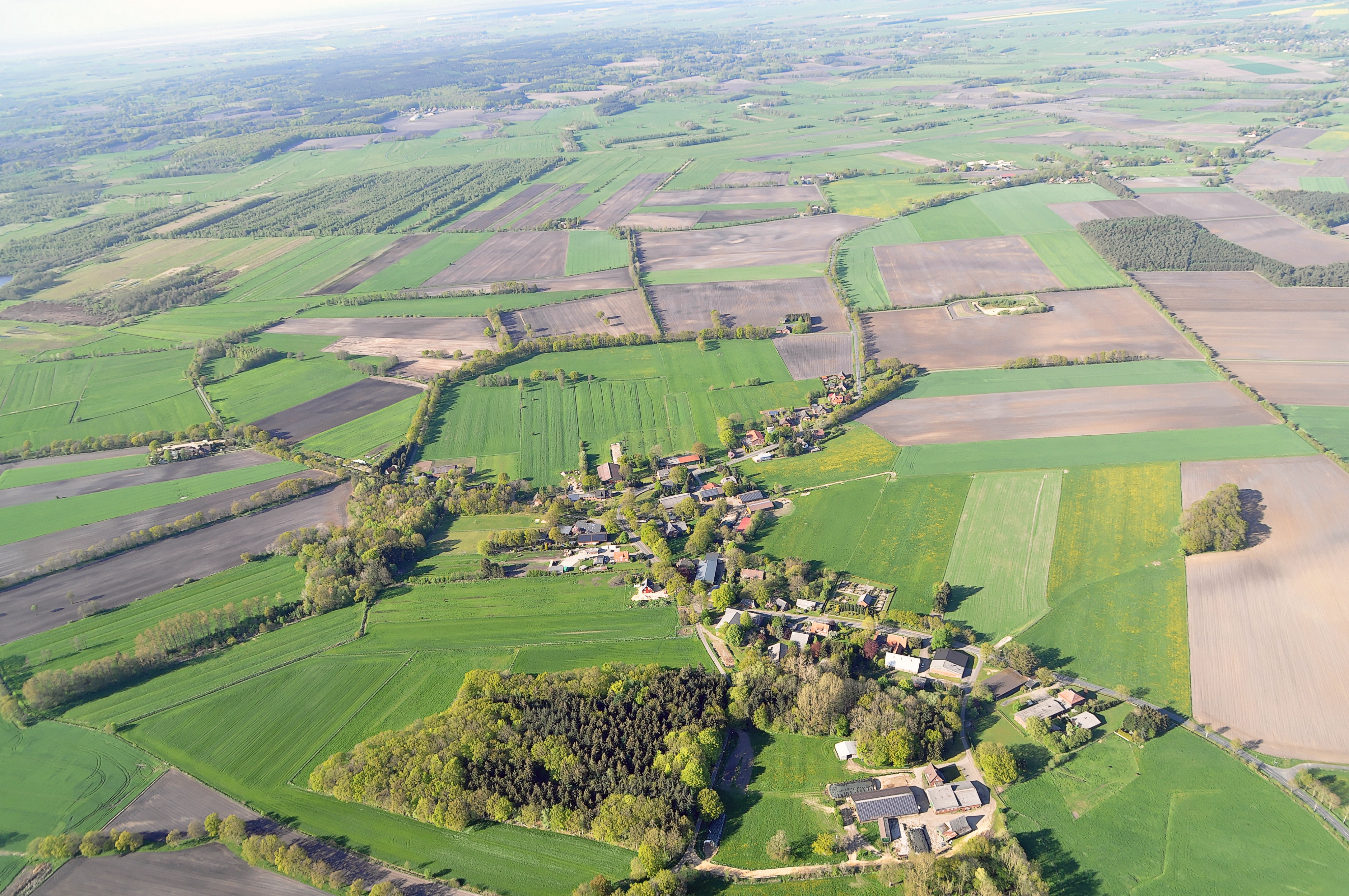 Luftbilder von der Nordseeküste 2012-05